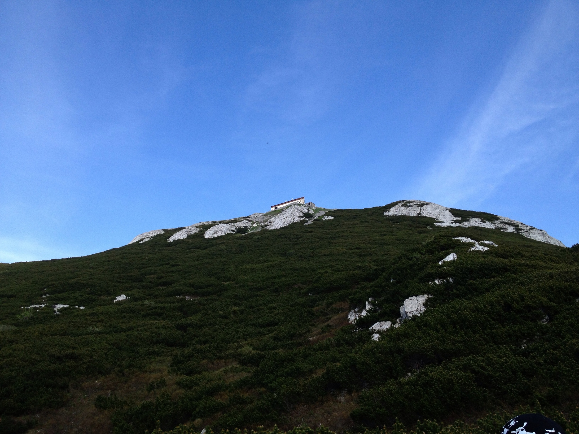 Snežnik 15. in 16. junij 2013